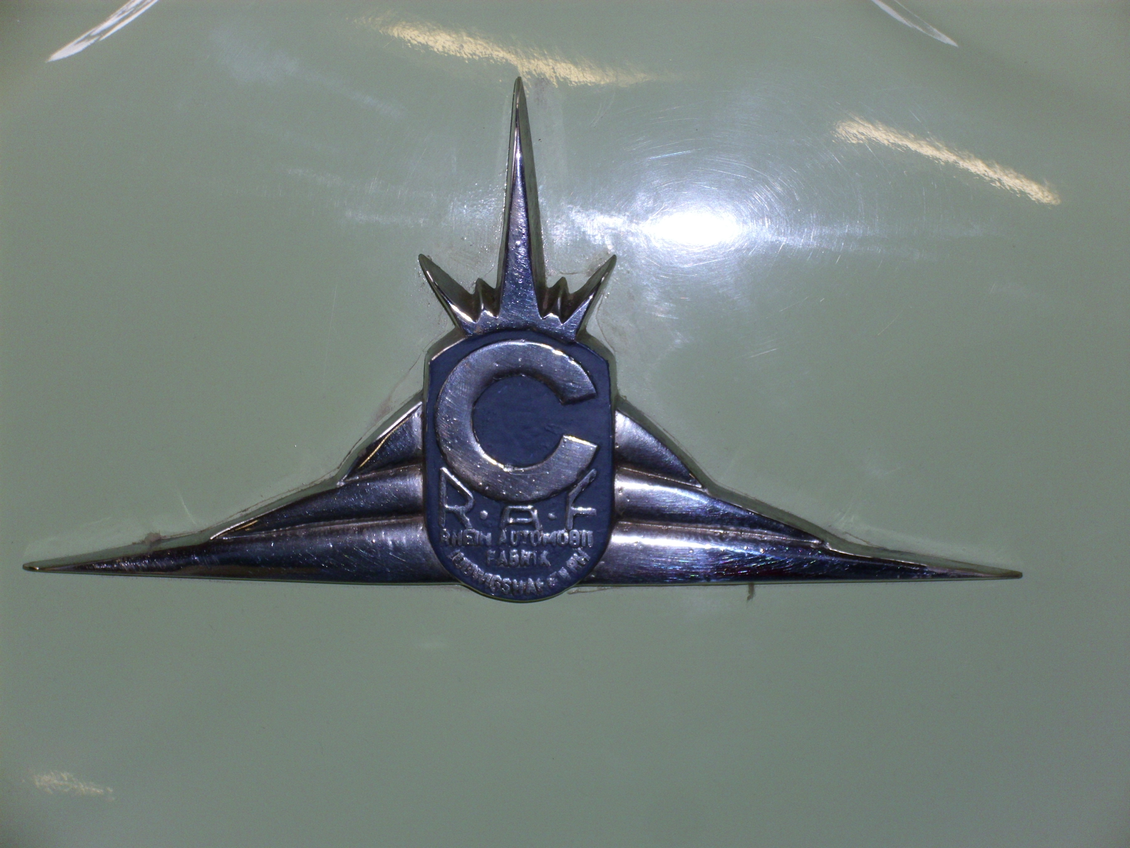 Emblem Champion (Rheinische Automobil-Fabrik, Hennhöfer & Co.) 1953